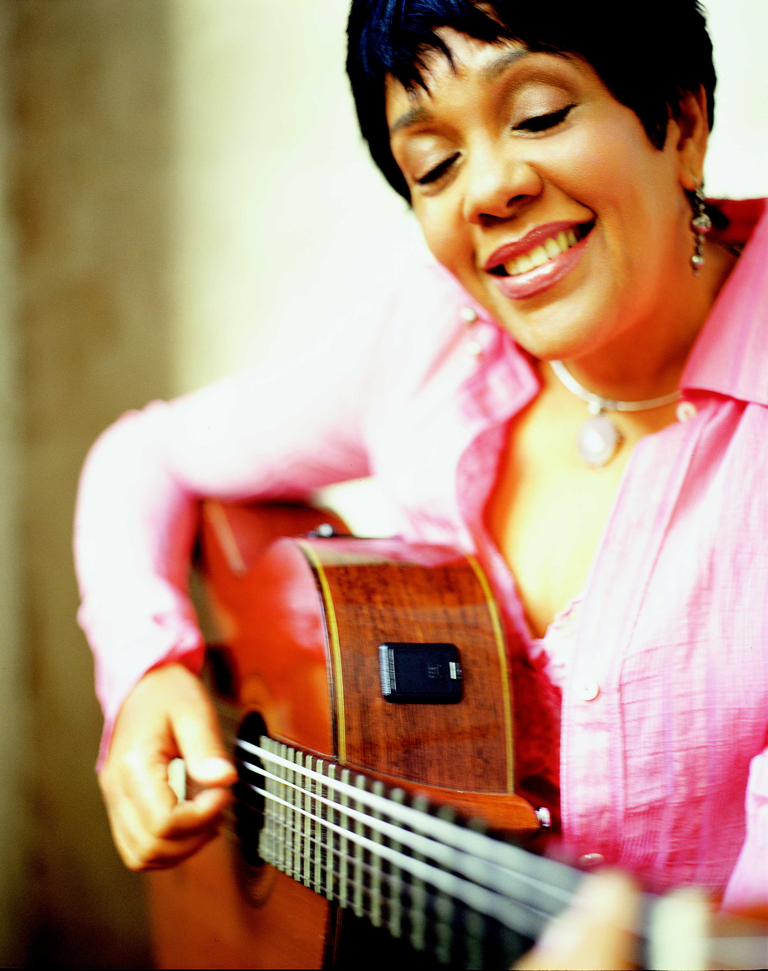 Presentacion de disco en Sao Paulo